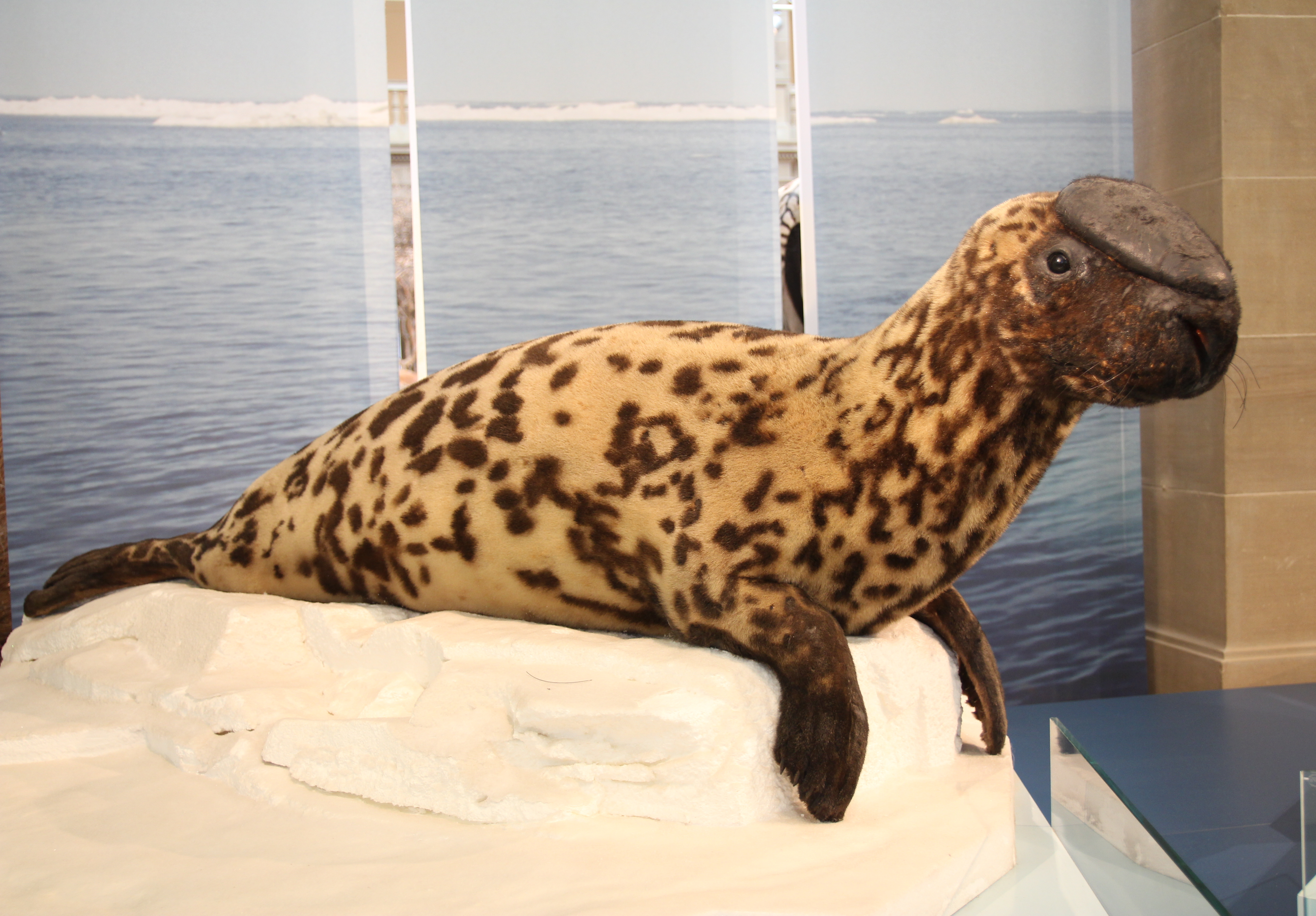 Museum Koenig. Klappmütze.